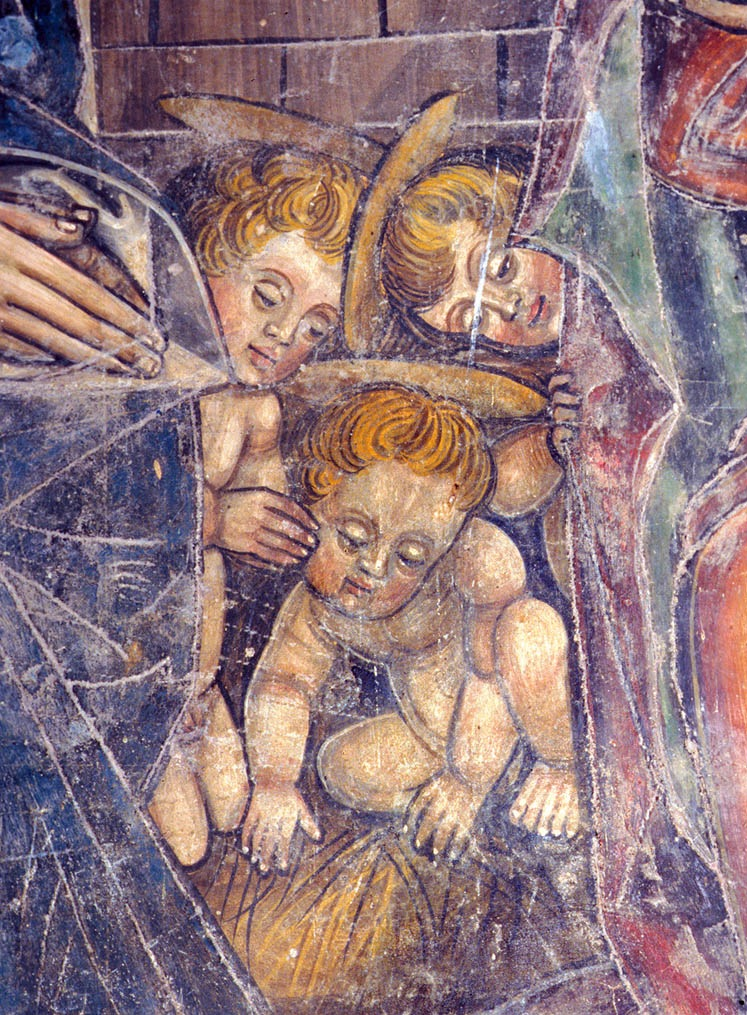 Pecetto (TO), chiesa di San Sebastiano, particolare della Natività (tre angioletti) attribuita a Jacopino Longo o a un emulo della sua scuola.